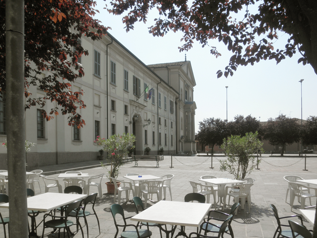 Brembio, vista di piazza Matteotti